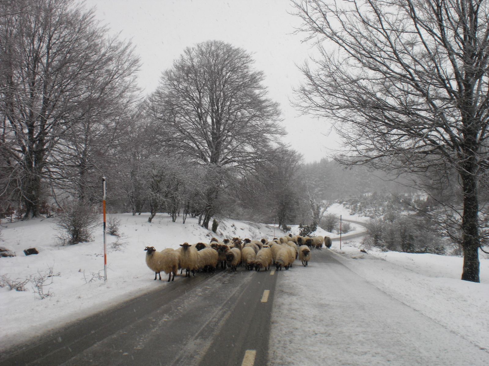 Artaldea Urbasako errepidearen erdian.